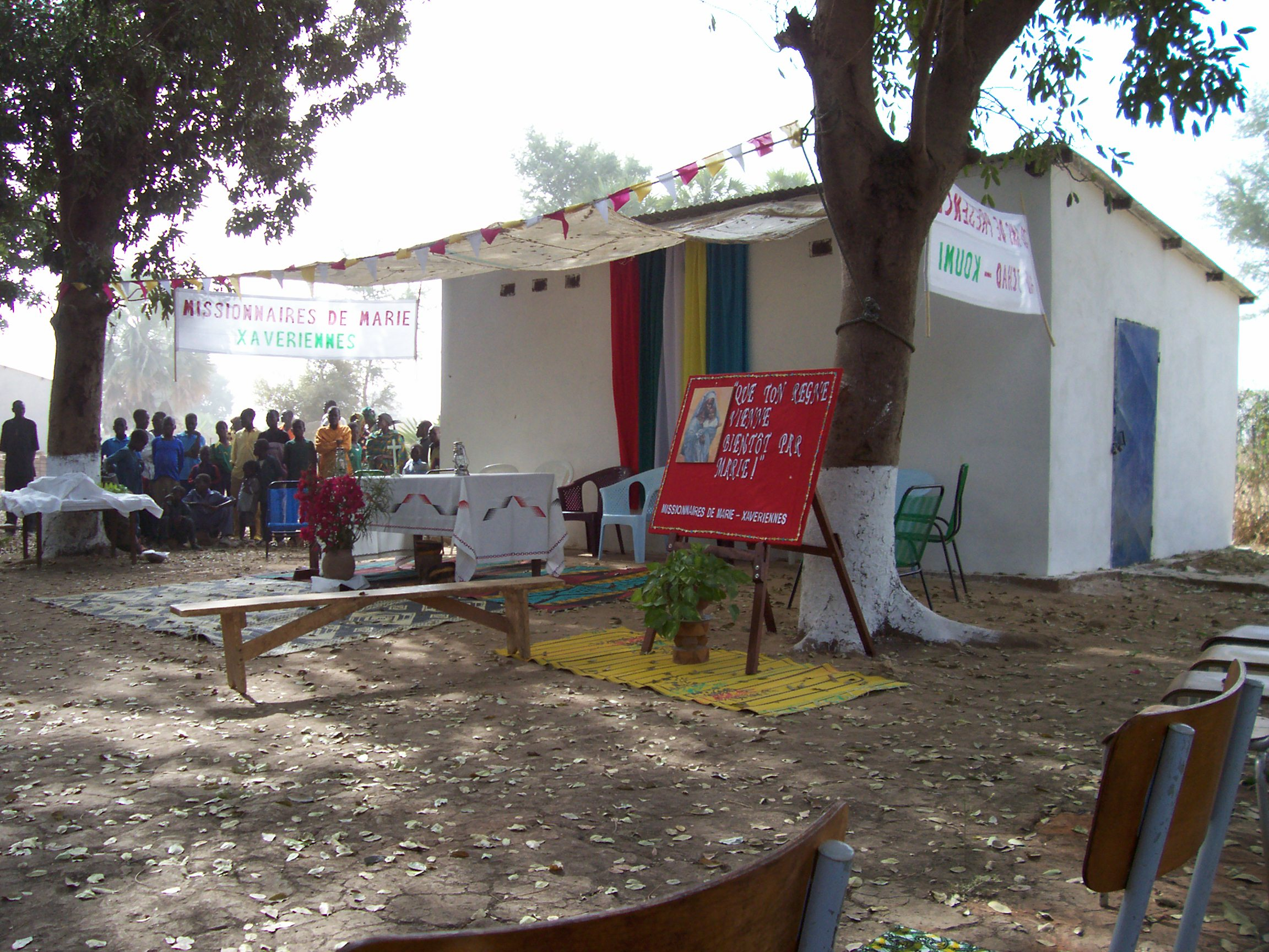 foto personale in Africa francofona - Ciad